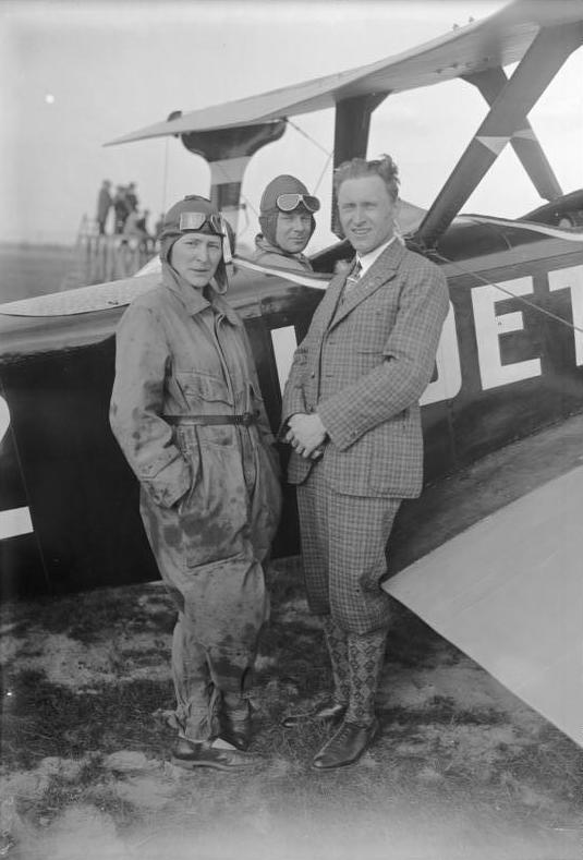 Großflugtag in Staaken bei Berlin! Am 2. Osterfeiertag fand ein Großflugtag in Staaken bei Berlin statt, bei dem die bekanntesten deutschen Piloten vor Zehntausenden von Zuschauern ihre Künste zeigten. Der Höhepunkt der Veranstaltung war die Vorführung, der Original Bleriot-Maschine mit welcher der Pilot Bleriot den Ärmel-Kanal im Jahre 1909 überflog. Die beste Pilotin und Piloten Deutschlands auf dem Großflugtag in Staaken bei Berlin. v.li.n.re: die erst Berliner Kunstpilotin Frl. Marga von Etzdorff , der bekannte deutsche Pilot Ernst Udet, der Pilot Fieseler, beide bekannt durch ihre waghalsigen Schauflüge. Information added by Wikimedia users.